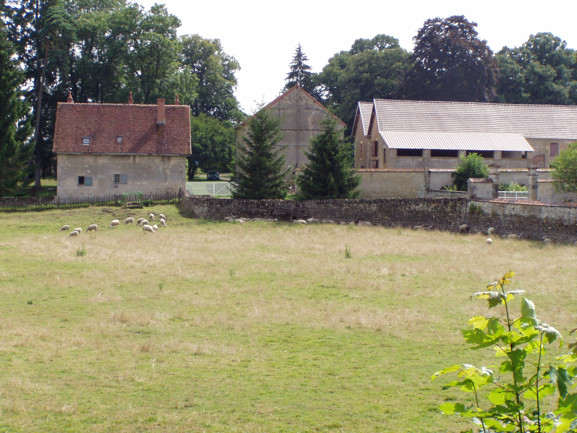 Vue de l'ancienne abbaye de Bourras (Nièvre).